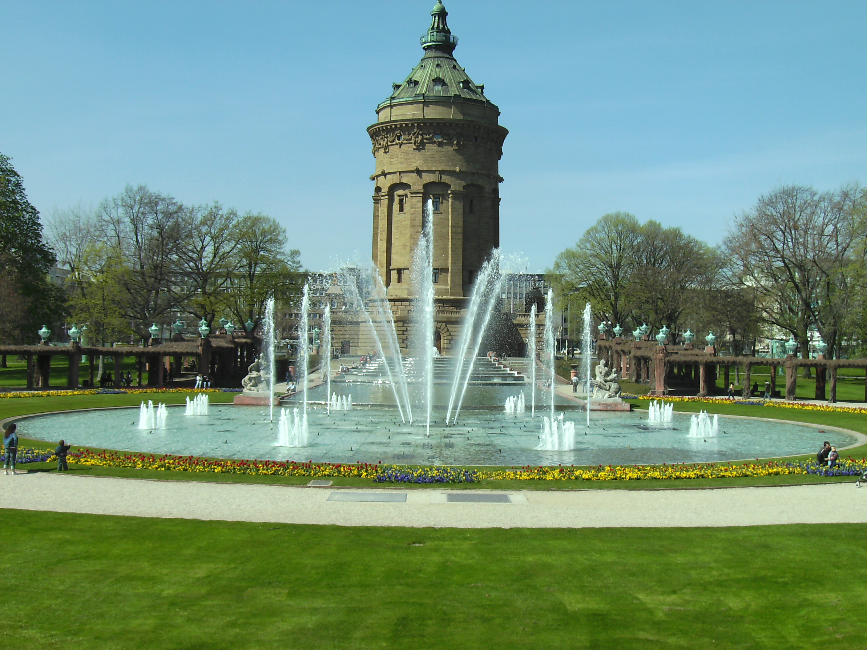 Mannheimer Wasserturm: Brunnenanlage mit Park (Sculptures by Franz Metzner}